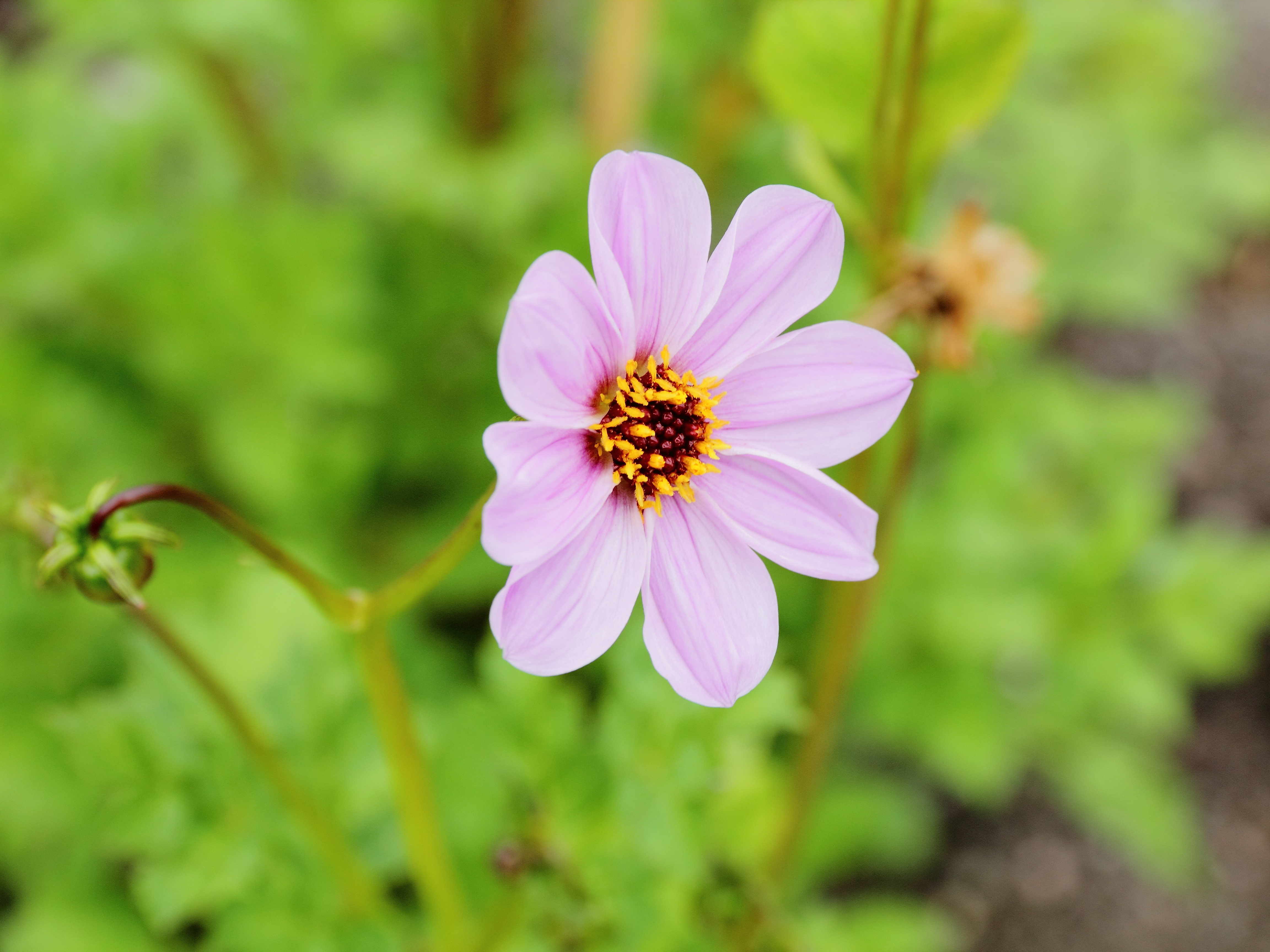 Dahlia merckii i Bergianska trädgården.